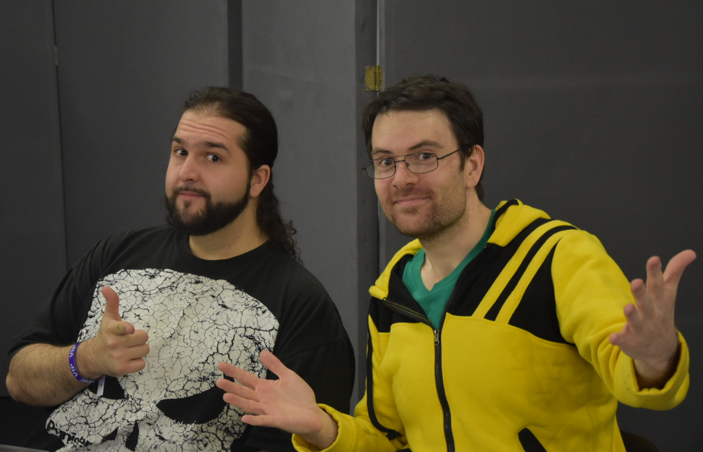 Joueur du Grenier (de gauche à droite : Sébastien Rassiat, Frédéric Molas) en séance de dédicace à Polymanga en 2017.